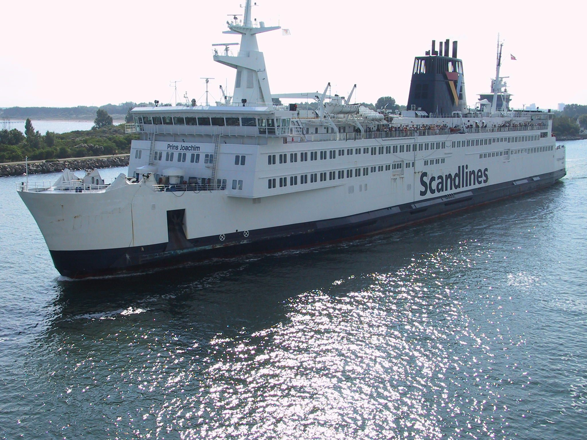 Prins Joachim Scandlines (2001) IMO Number: 7803190 MMSI Number: 219001232 Callsign: OYDE2 Length: 152 m Beam: 24 m